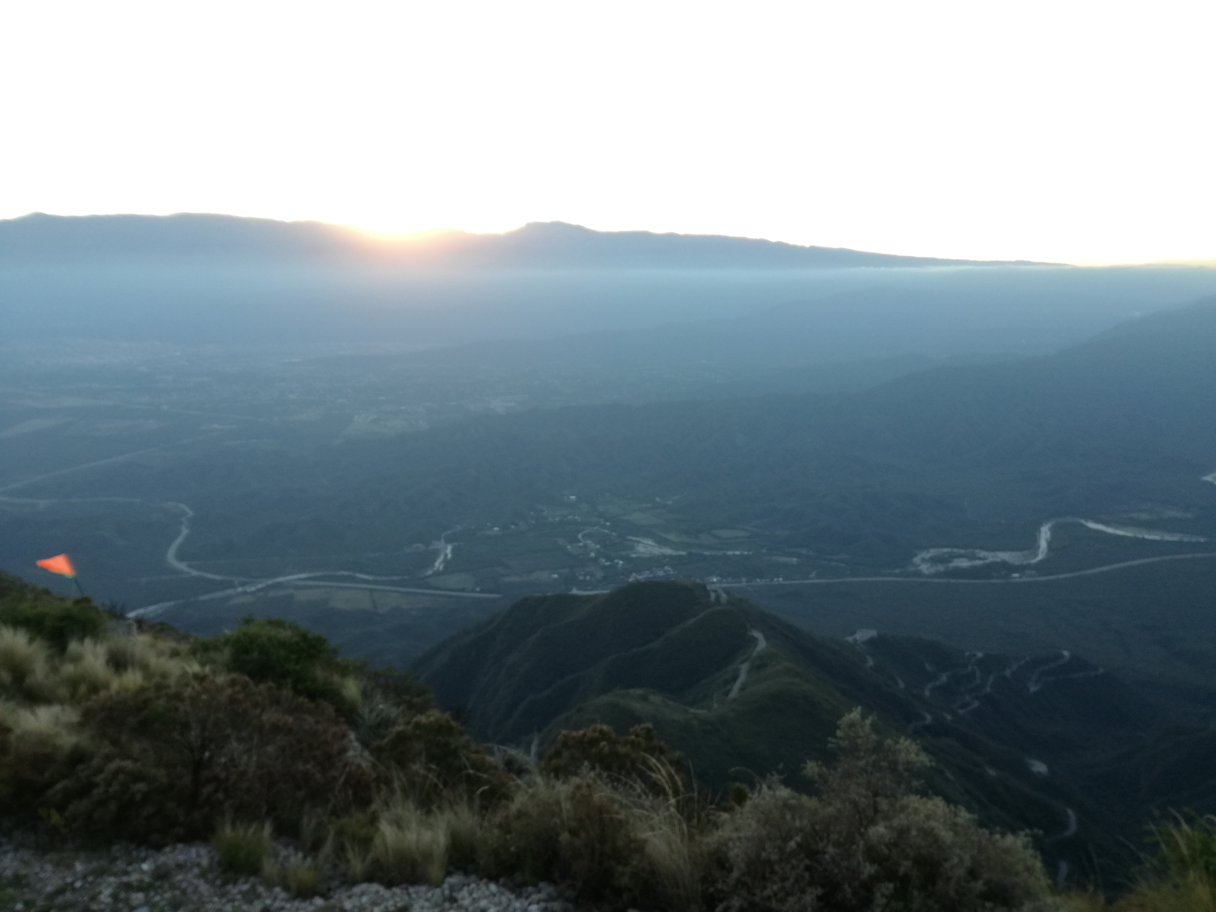 Cuesta del Portezuelo. Desde la cumbre.